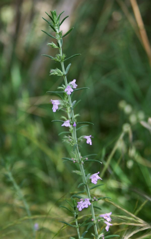 Micromeria graeca subsp. graeca, Lippenblütler (Lamiaceae) - Italien/Italia/Italy: Kalabrien/Calabria, Prov. Reggio Calabria, Aspromonte, bei San Peri, SSE Scilla